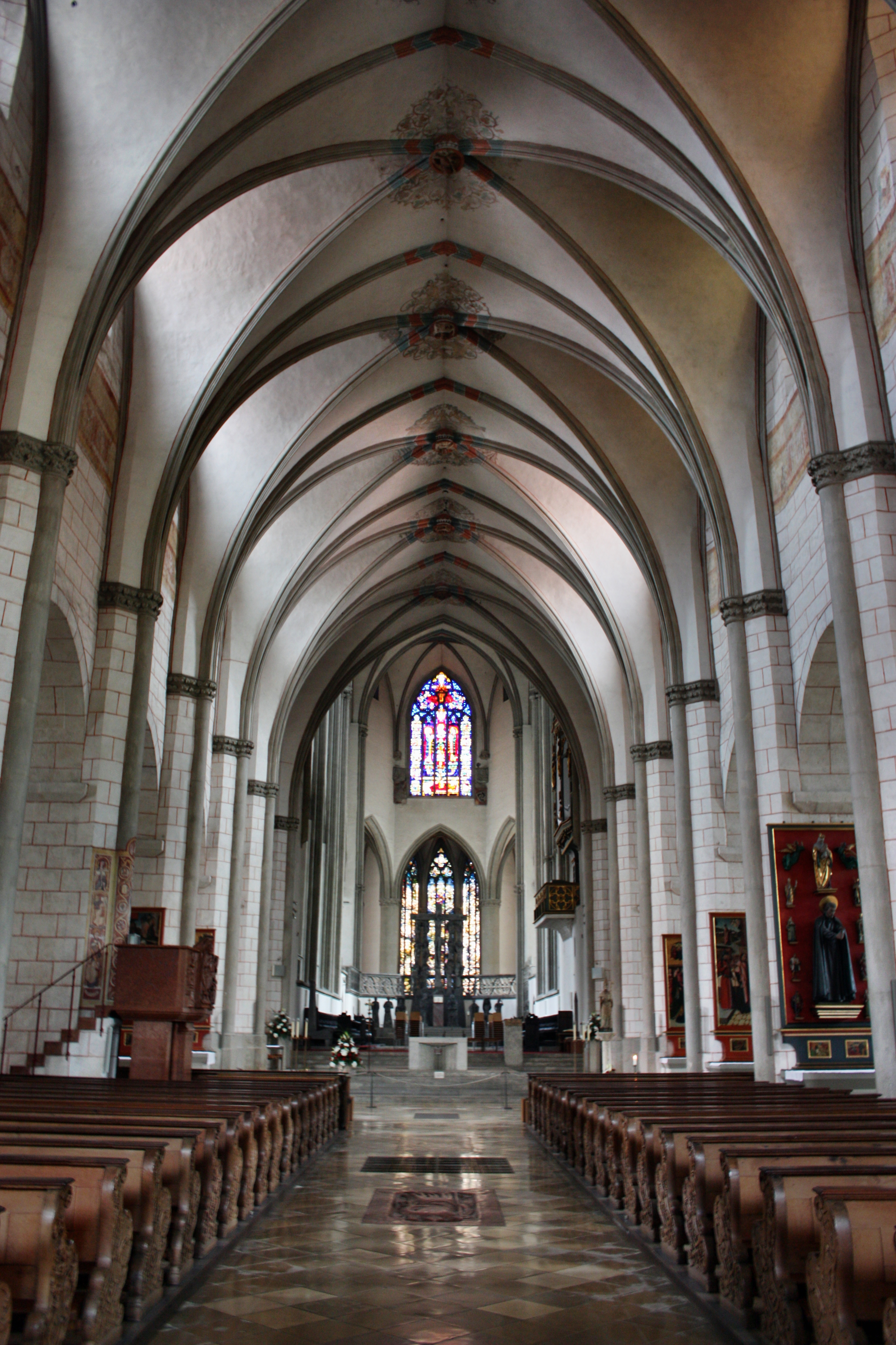 Dom Unserer Lieben Frau, Augsburg